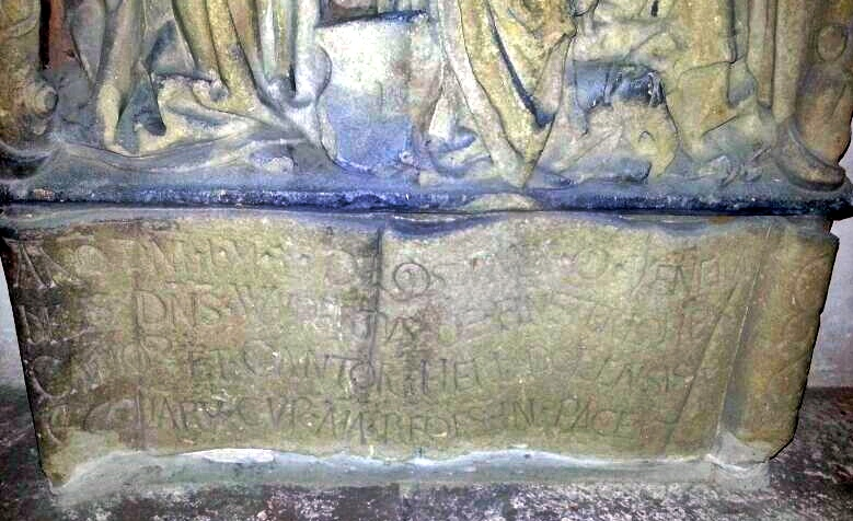 Epitaphinschrift Domherr Wipert von Finsterlohe (+ 1503) im Dom zu Speyer